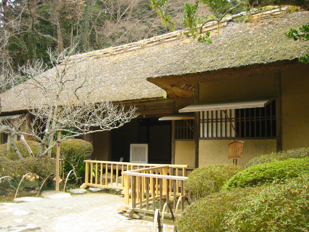 西山荘西山御殿